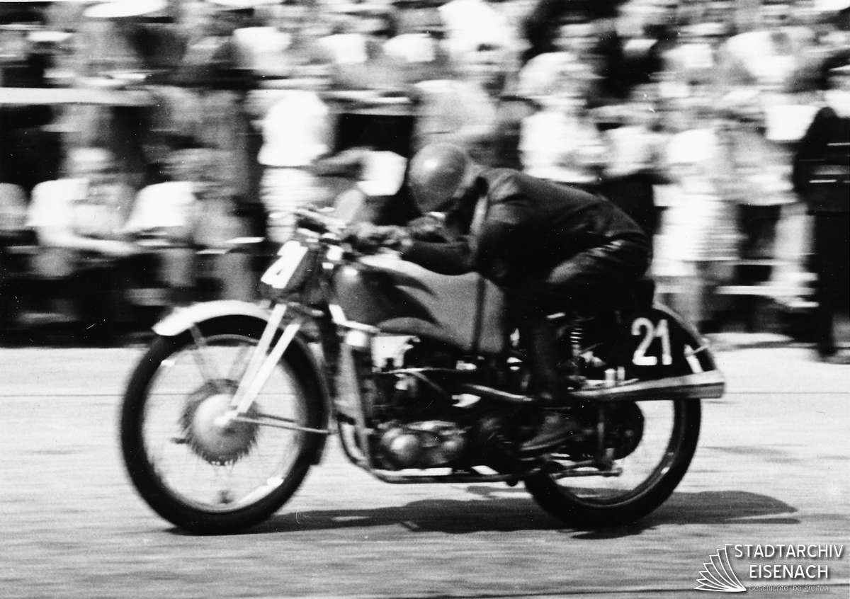 Walfried Winkler rast an der Tribüne vorbei.